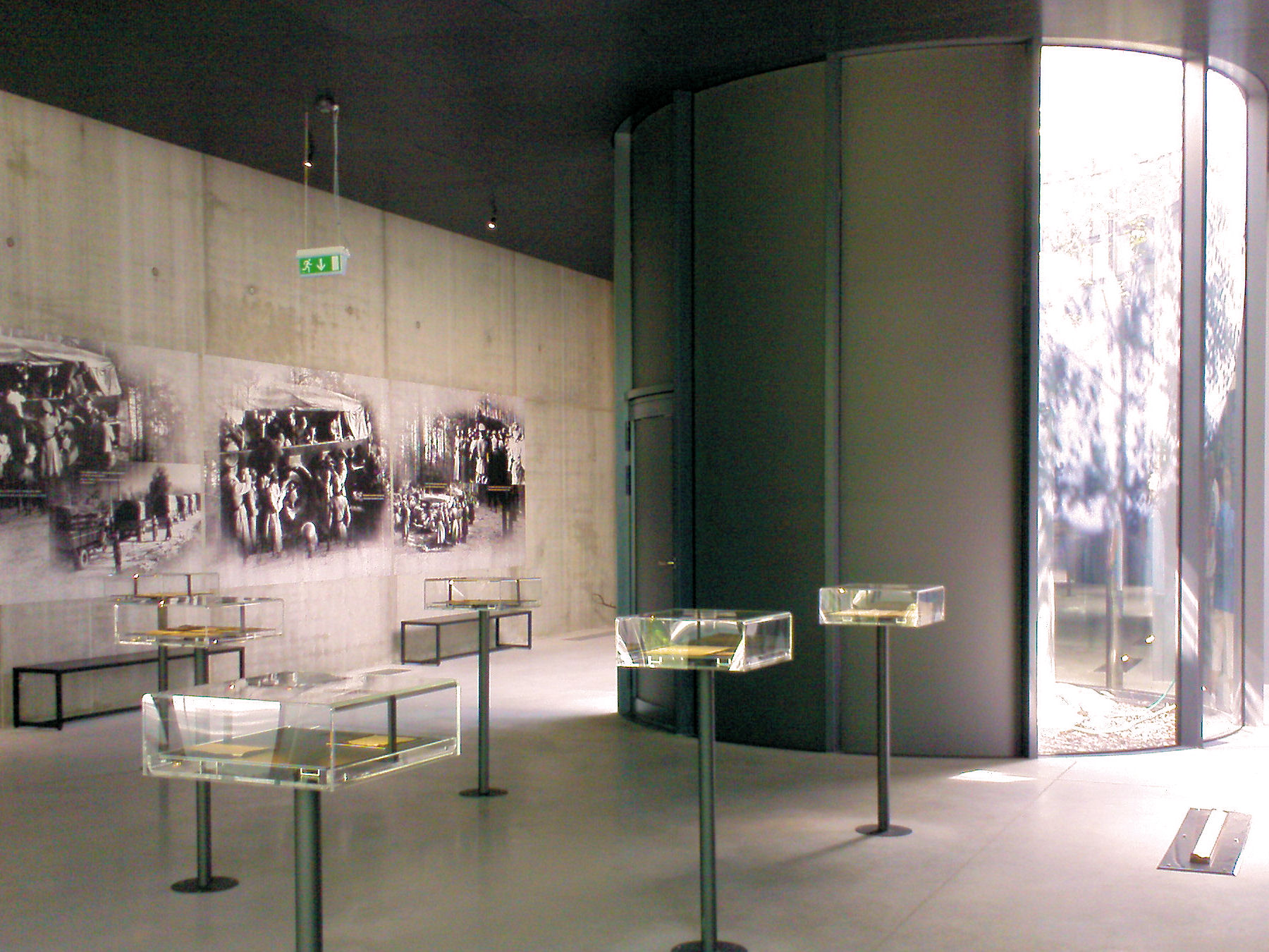 Muzeum wraz z cmentarzem w Palmirach miejscem pamięci narodowej